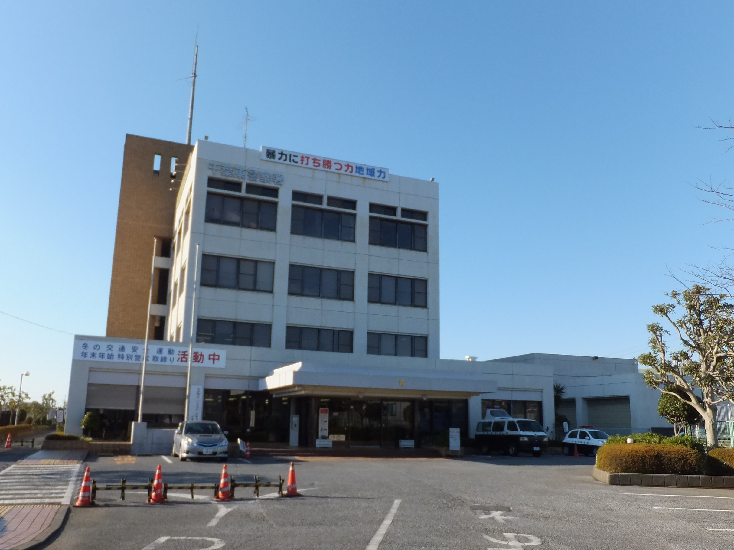 千葉県警察千葉東警察署（千葉市若葉区）